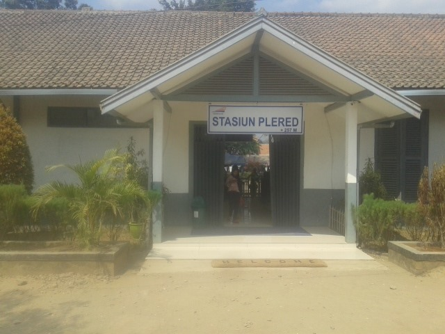 Pintu masuk Stasiun Plered